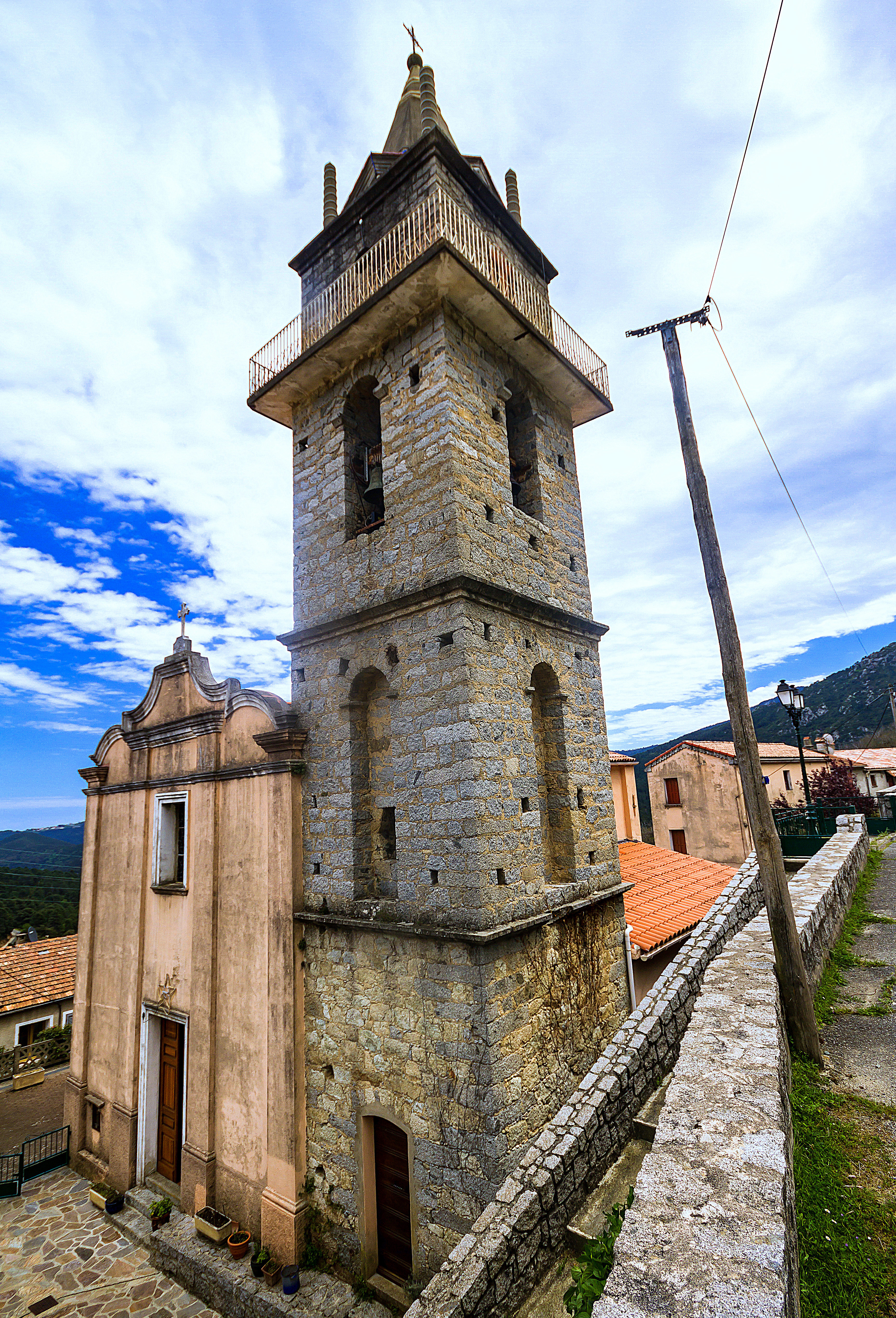 San-Gavino-di-Fiumorbo, Fiumorbo (Haute-Corse) - Vue de l'église Saint-Antoine Abbé